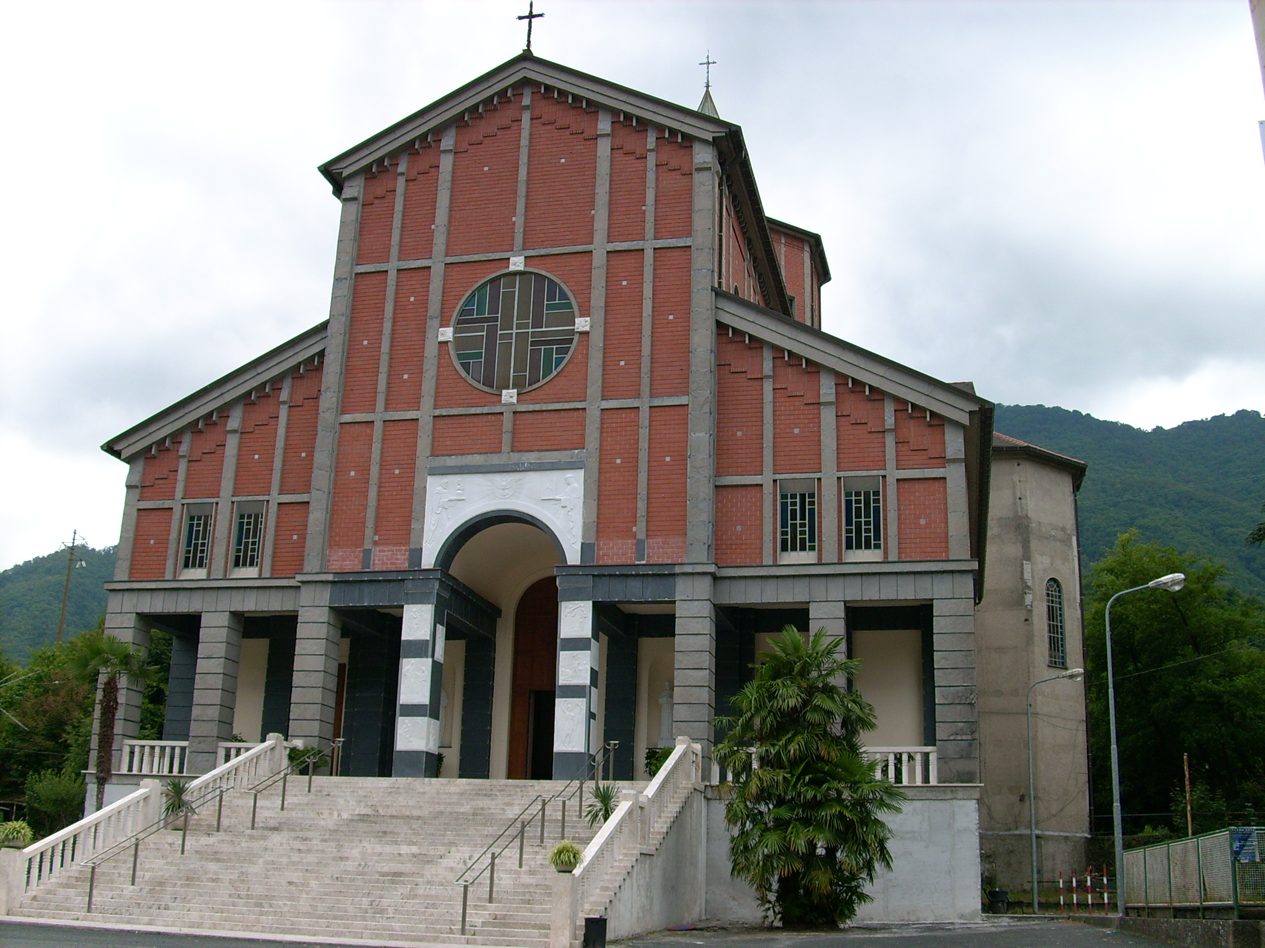 Santuario di Nostra Signora dei Miracoli presso Cicagna, Liguria, Italia